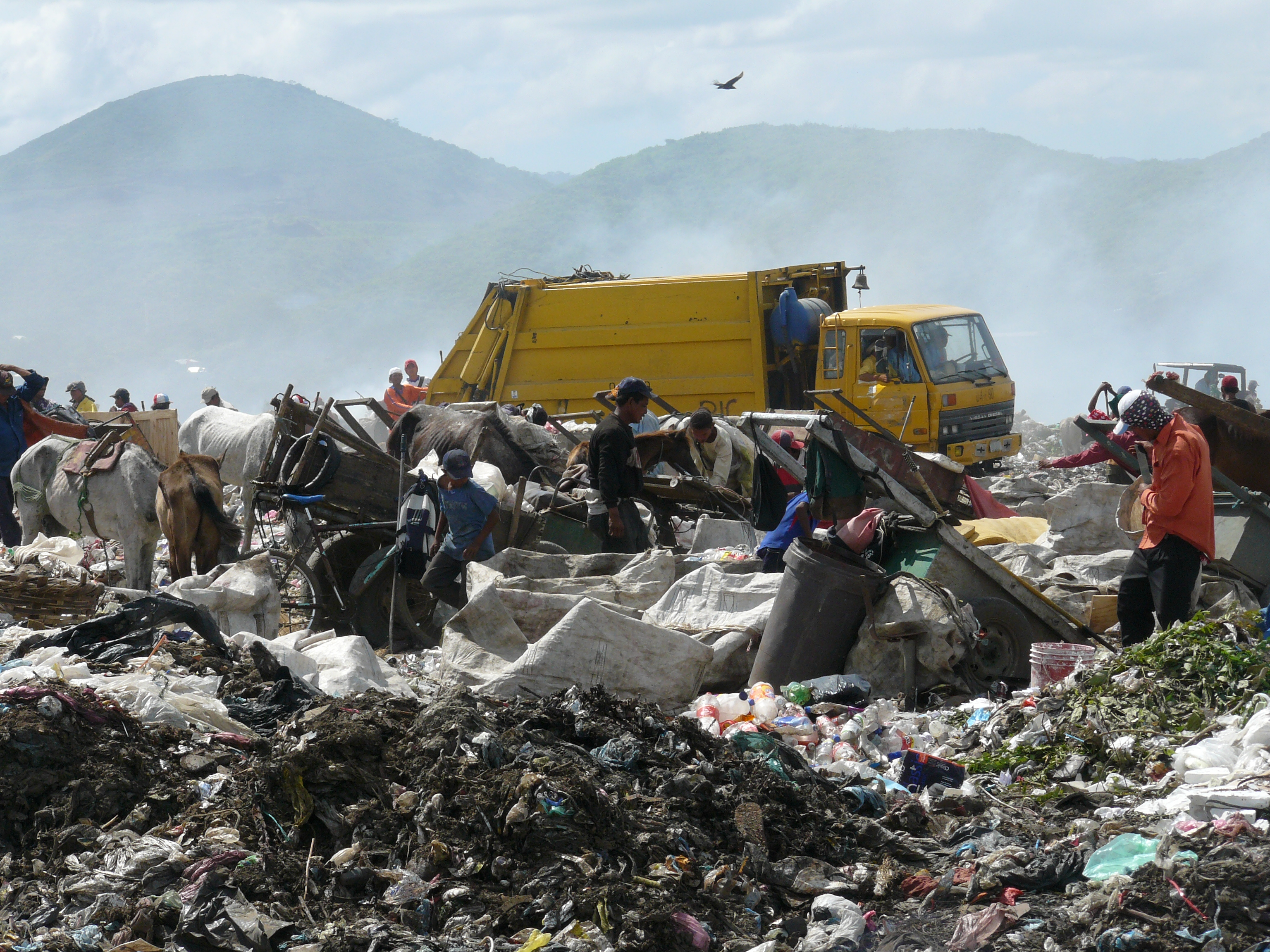 carros de caballos en el vertedero